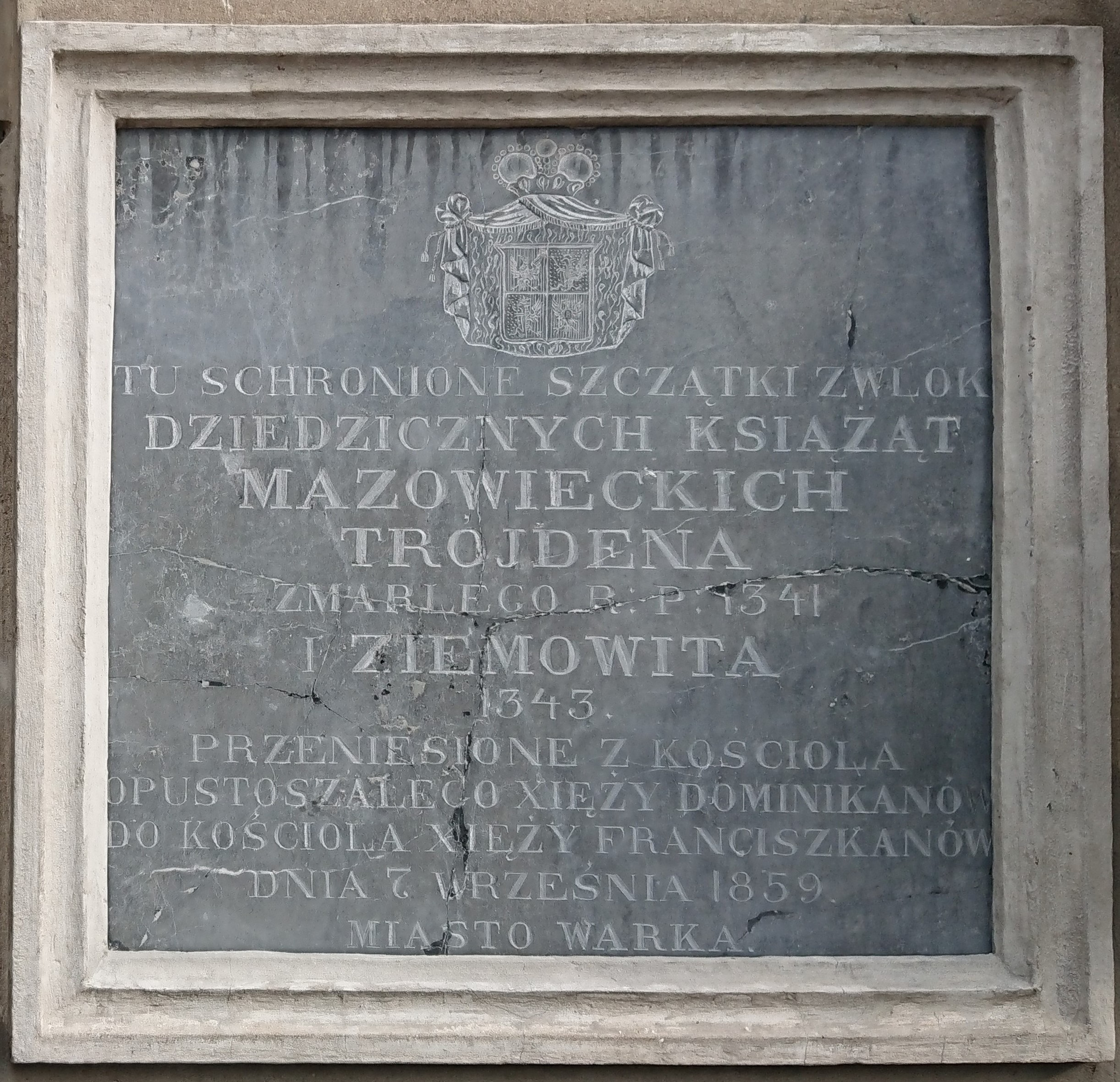 Tablica informująca o szczątkach księcia Trojdena i księcia Ziemowita na zewnętrznej ścianie (na prawo od głównego wejścia) kościoła Matki Bożej Szkaplerznej w Warce